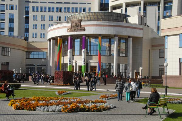 Фотография центральной площадки 5-ого фестиваля науки в Москве (2010 год) — Первый учебный корпус МГУ